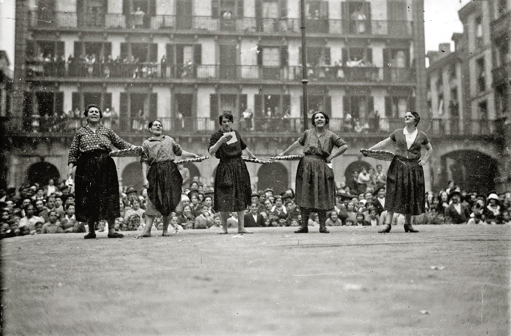 Título original: Concurso de pregoneras de pescado en la plaza de la Constitución (6/6) Localización: San Sebastián (Guipúzcoa)